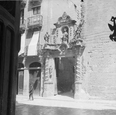 Imatge